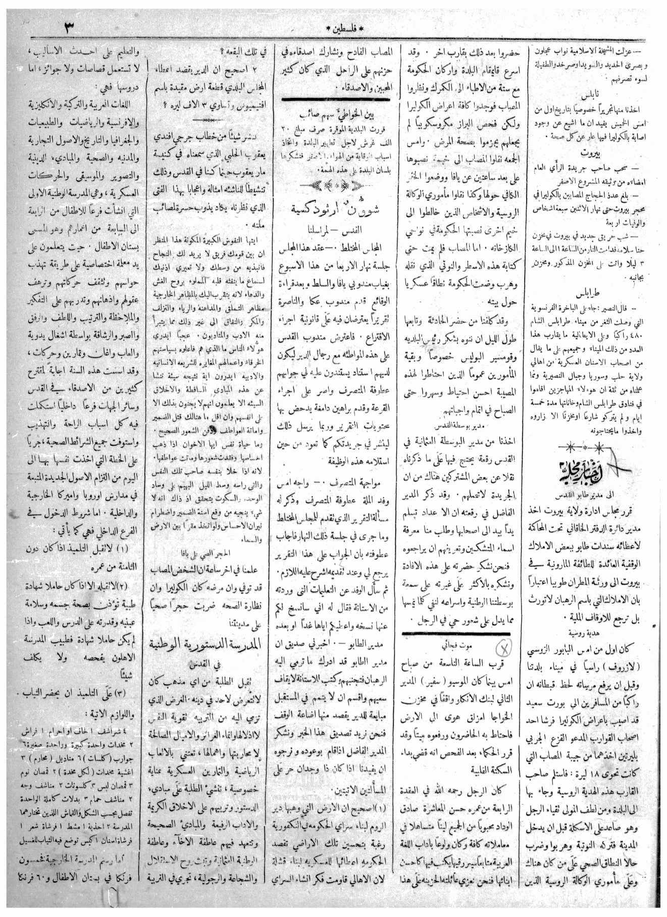 اعلان للمدرسة الدستورية في صحيفة فلسطين 9 شباط 1911